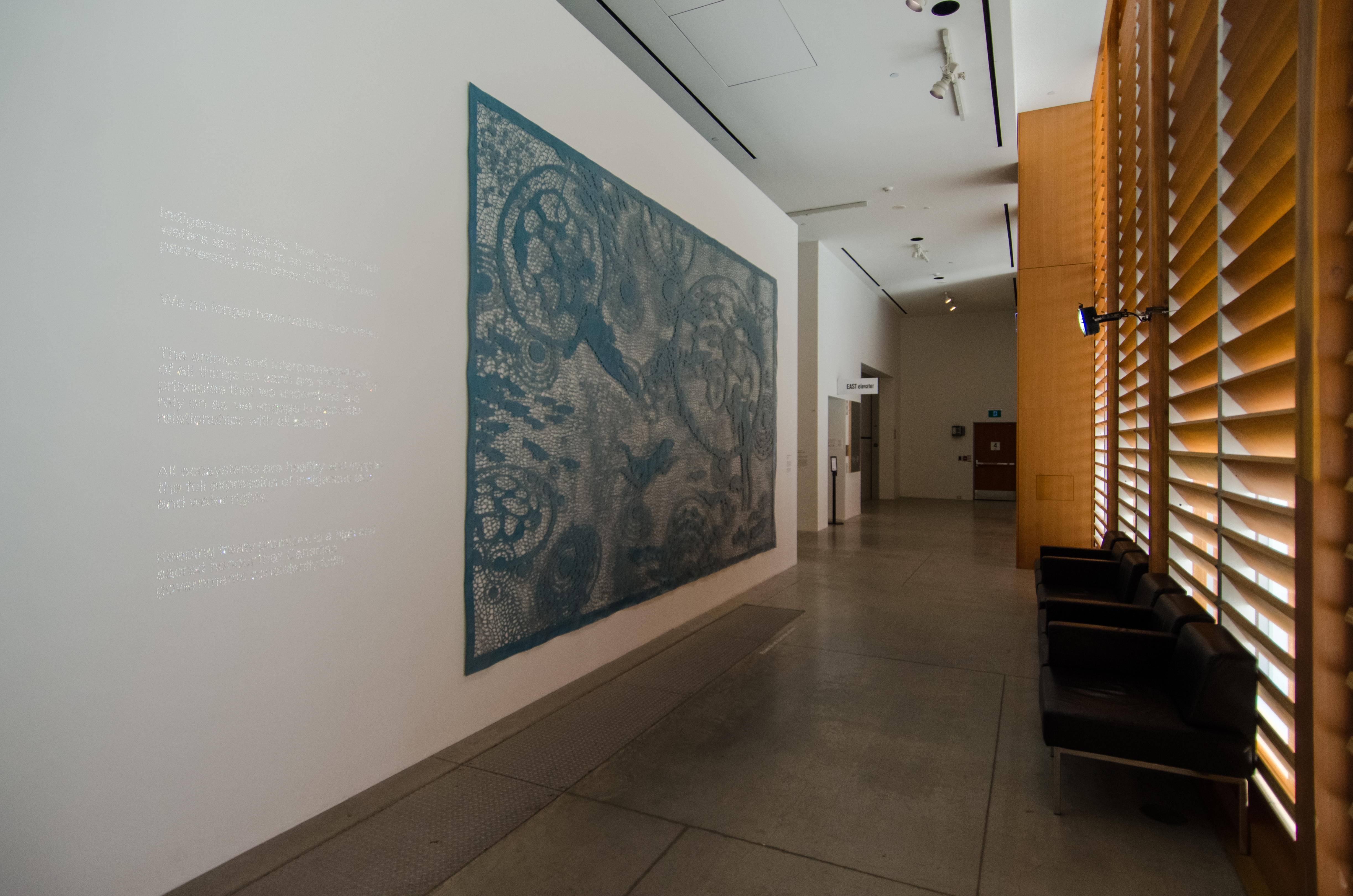 Seen in Hannibal #107 & Lost Girl #510.